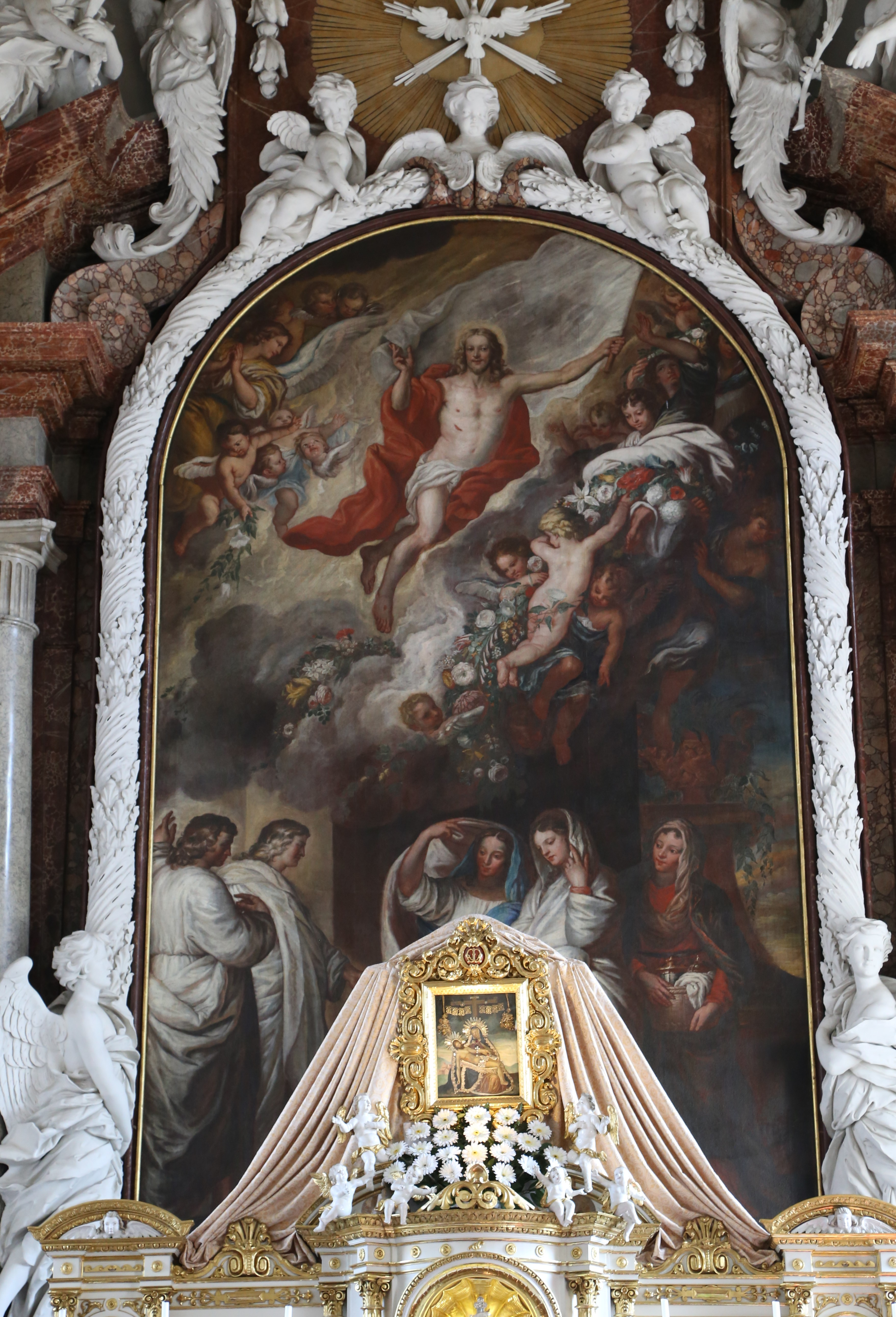 Gartlberg, Pfarrkirchen; Katholische Wallfahrtskirche, Barockbau mit Doppelturmfassade und Hl. Grab-Kapelle im Osten des Chores, 1669–1688 nach Plänen von Domenico Zuccalli erbaut, Fertigstellung um 1715 u. a. durch Giovanni Battista Carlone und Paolo Allio; mit Ausstattung